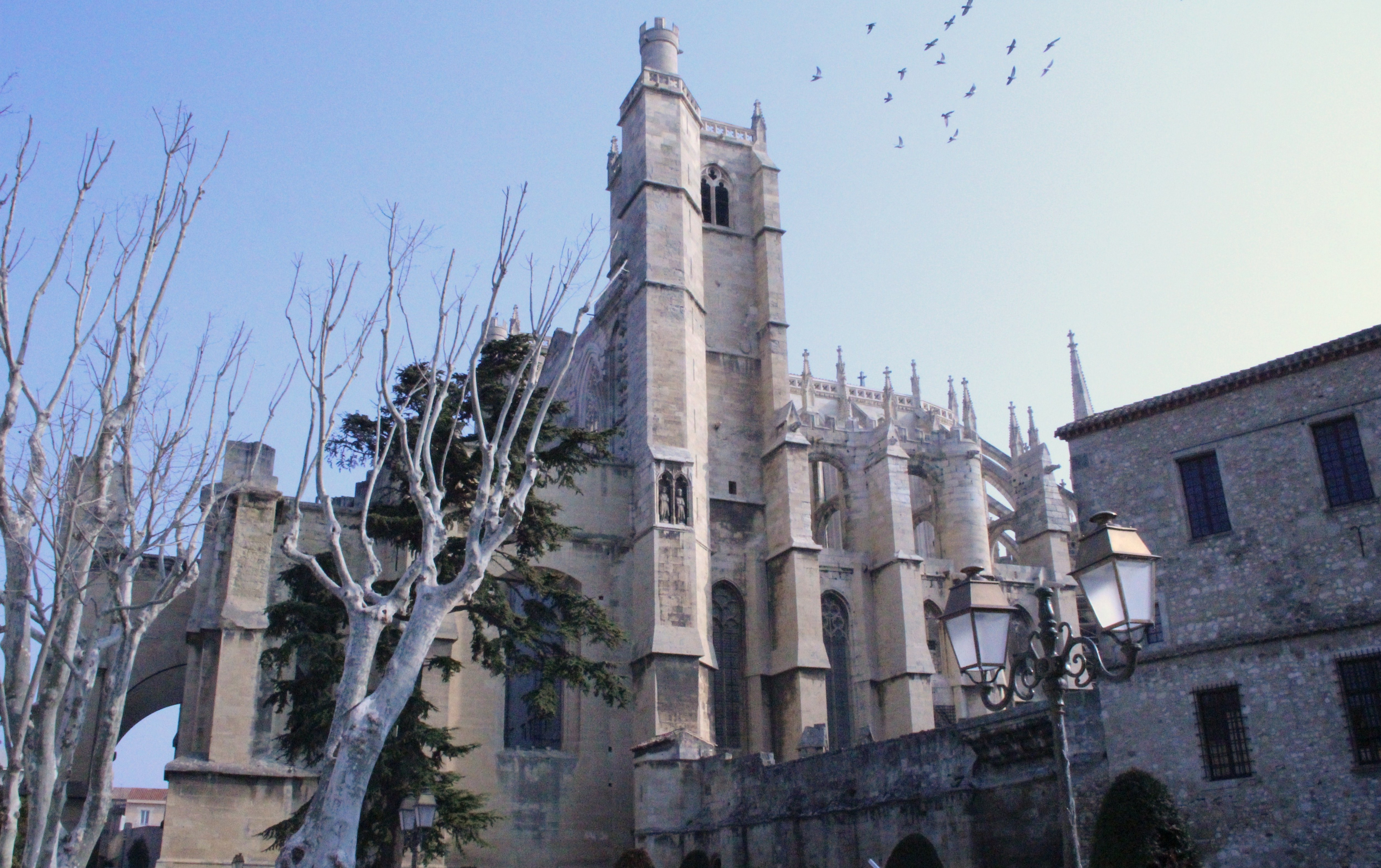 Clocher de la cathédrale .